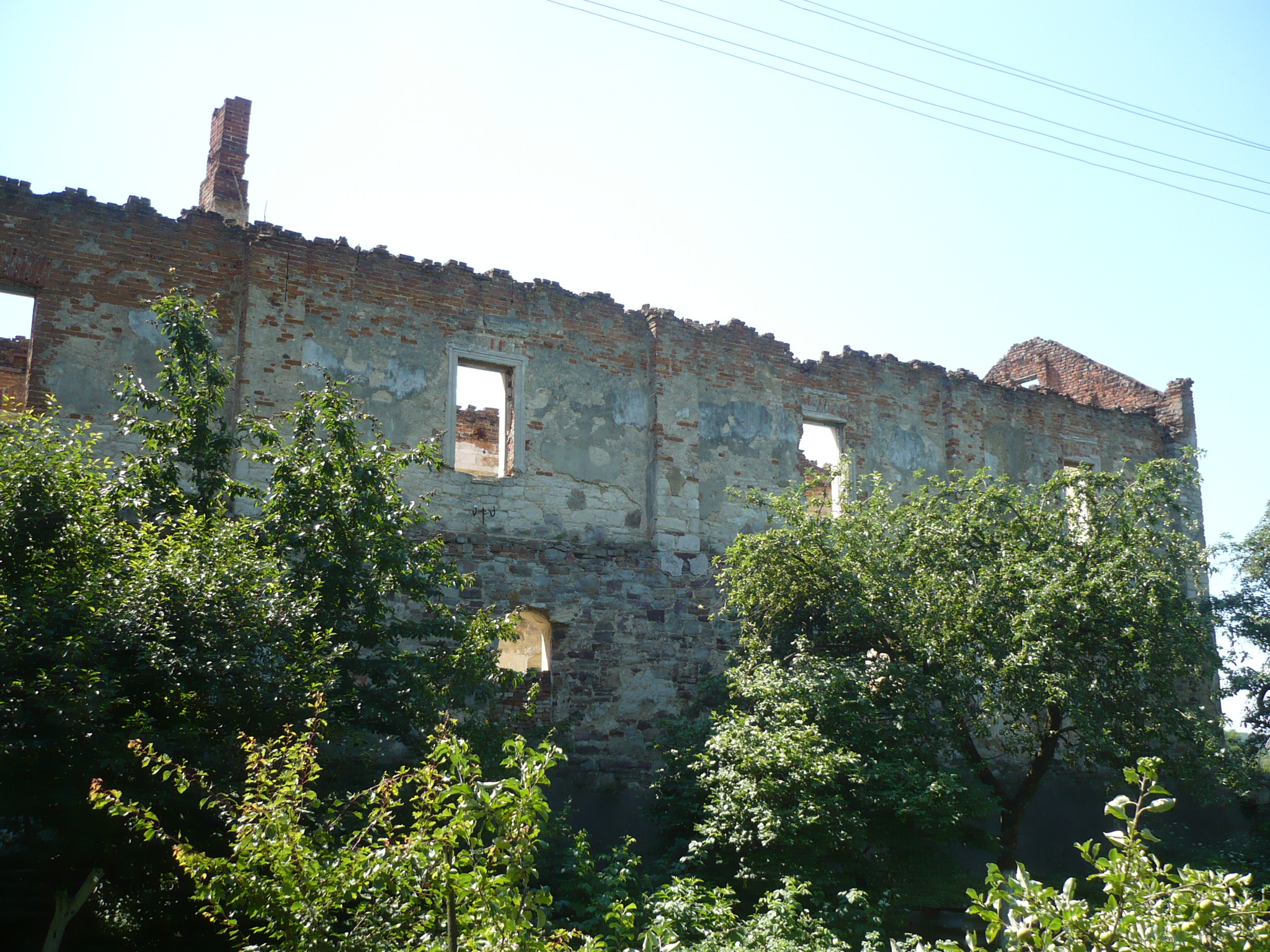 Potok Złoty. Zamek